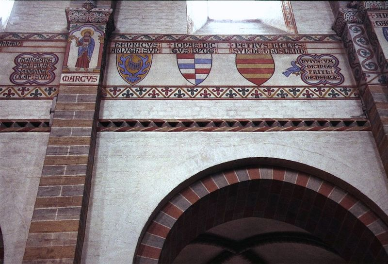 Sorø Klosterkirke